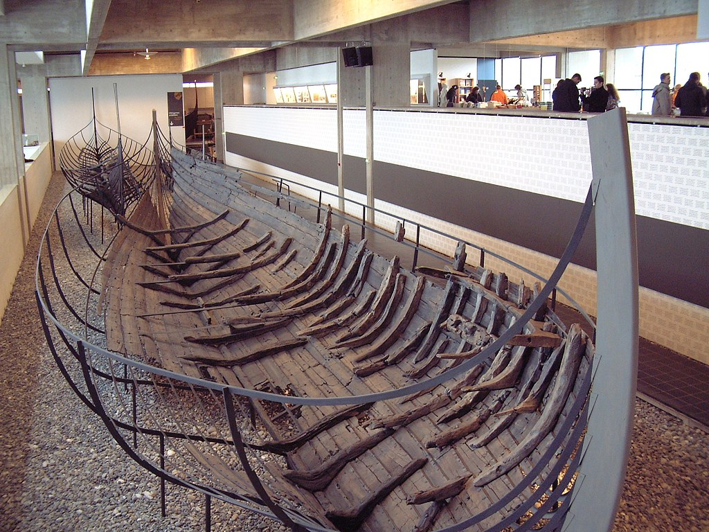 Skuldelev I: Ein wikingerzeitliches Hochseehandelsschiff, das im Roskilde-Fjord in der Nähe von Skuldelev gefunden wurde.